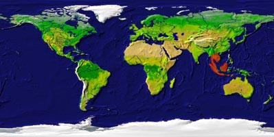 Verbreitungskarte (Arowana/Scleropages formosus) Source/Quelle: Fotografiert von Marcel Burkhard alias cele4